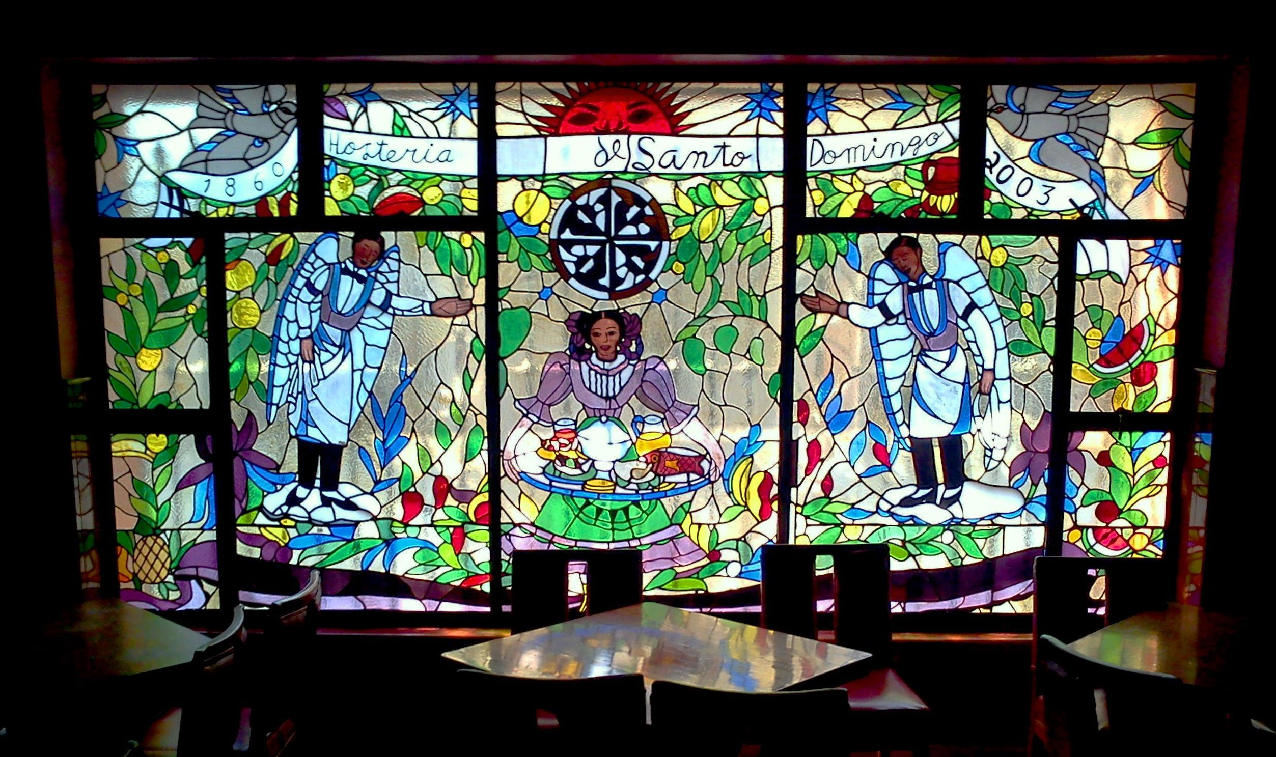 Vitral de la Hosteria Santo Domingo de Jose Gomez Rosas "El Hotentote"